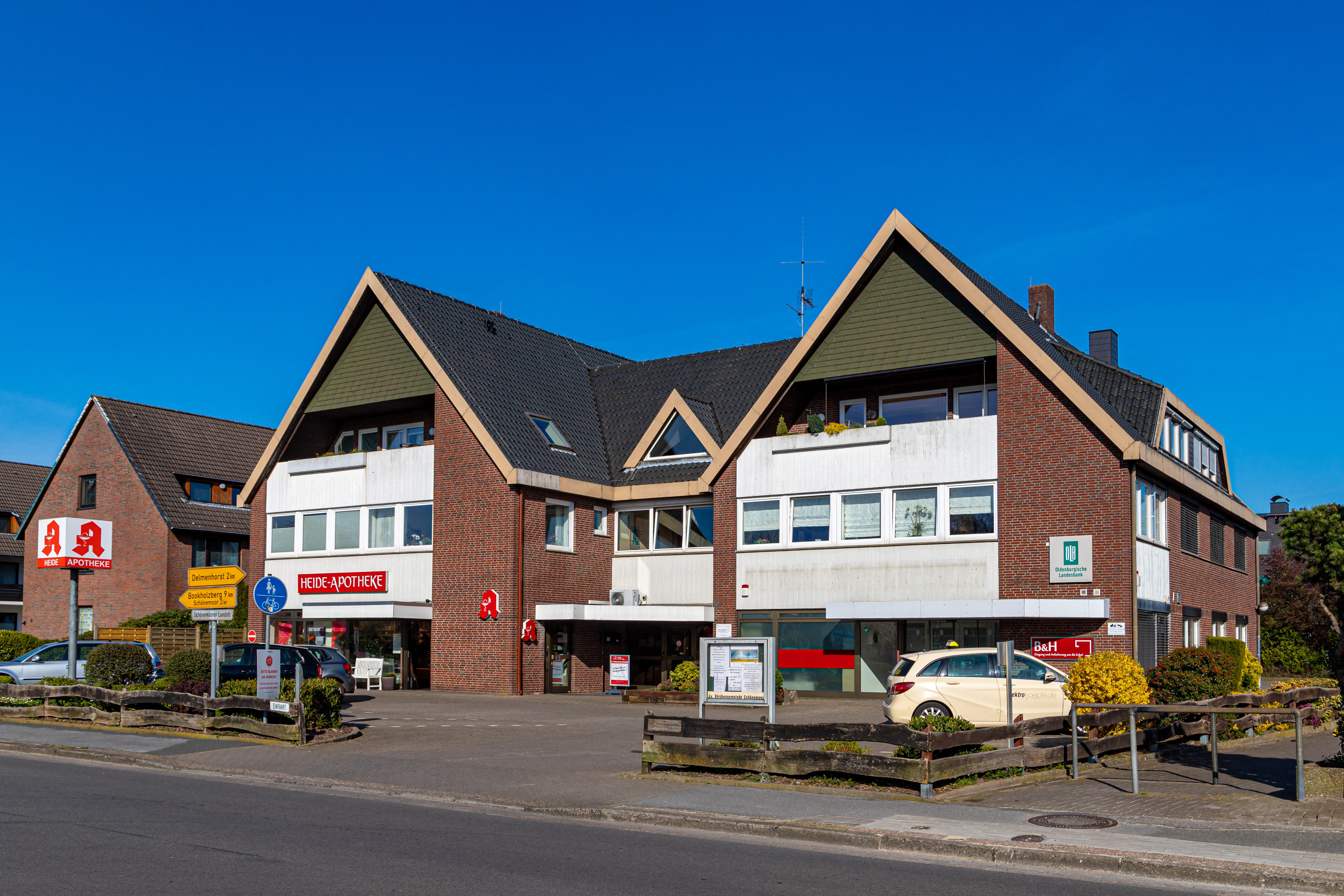 Blick auf das Ärztehaus Schönemoor Straße